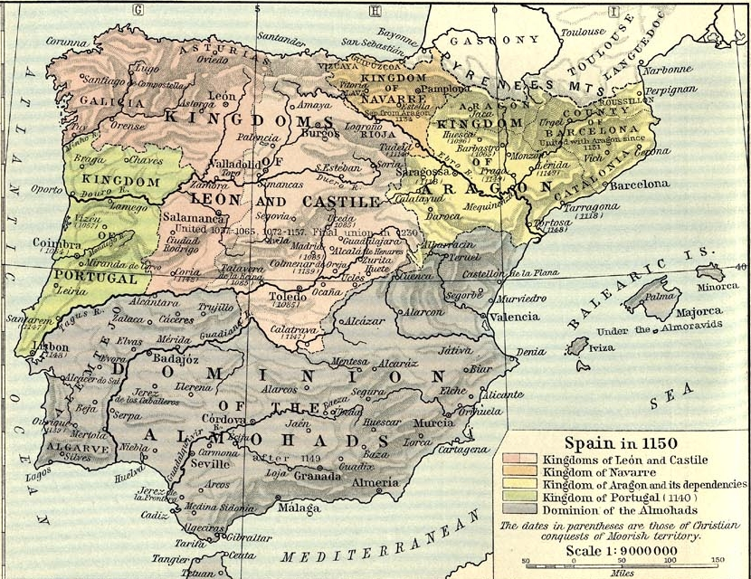 España en 1150